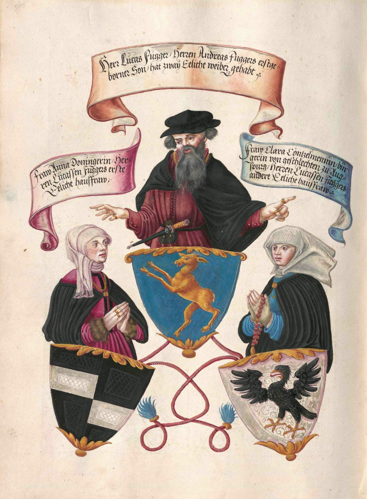 Geheimes Ehrenbuch der Fugger, hergestellt in der Werkstatt Jörg Breu d. J., 1545–1549 Portrait- und Wappendarstellung Lukas Fugger vom Reh, der Alte (1439–1495) Anna Doningerin (Dauninger) (2. Ehe) Clara Contzelmennin (Contzelmann) (3. Ehe)